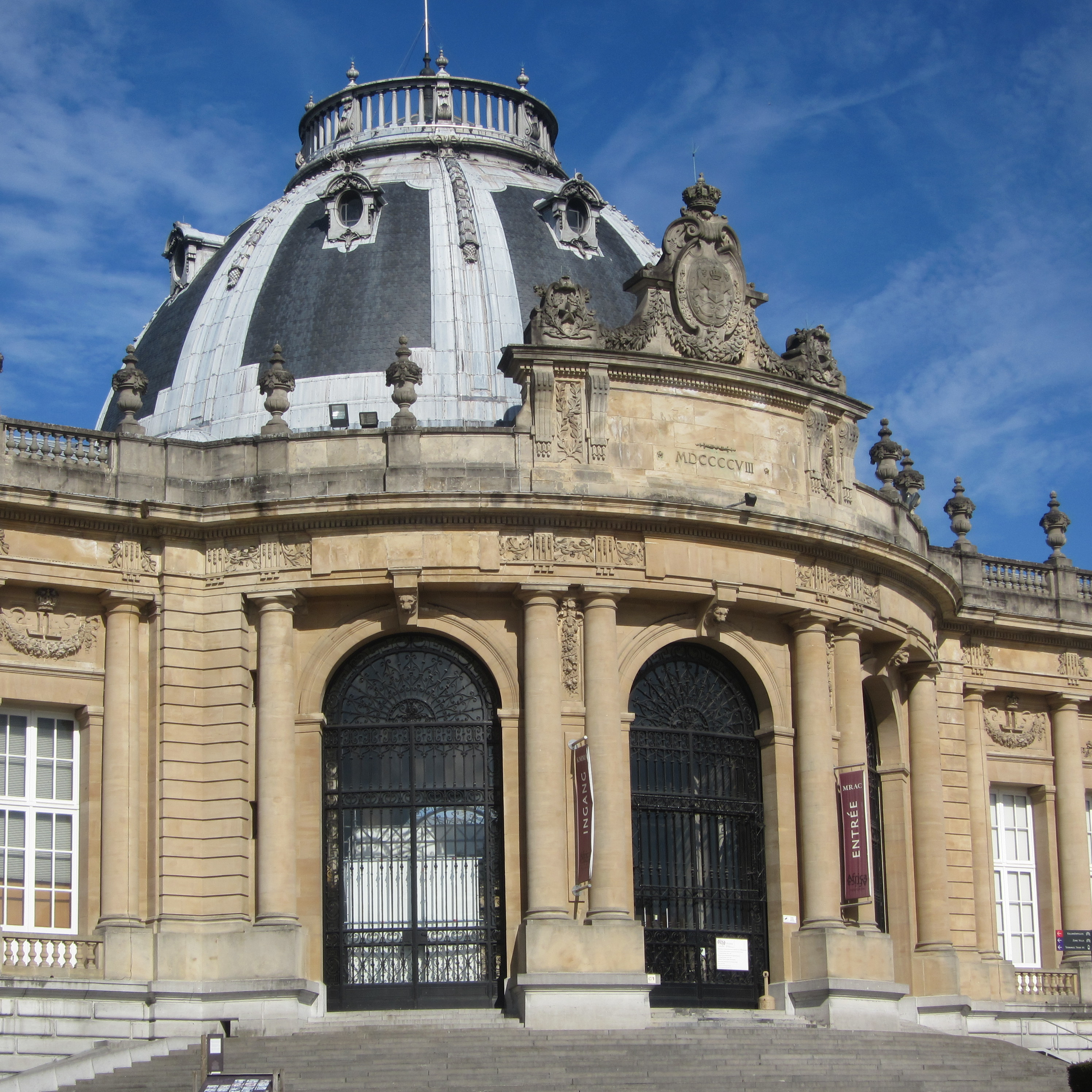 Ingang langs tuinzijde met gerestaureerde koepel Koninklijk Museum voor Midden Afrika te Tervuren